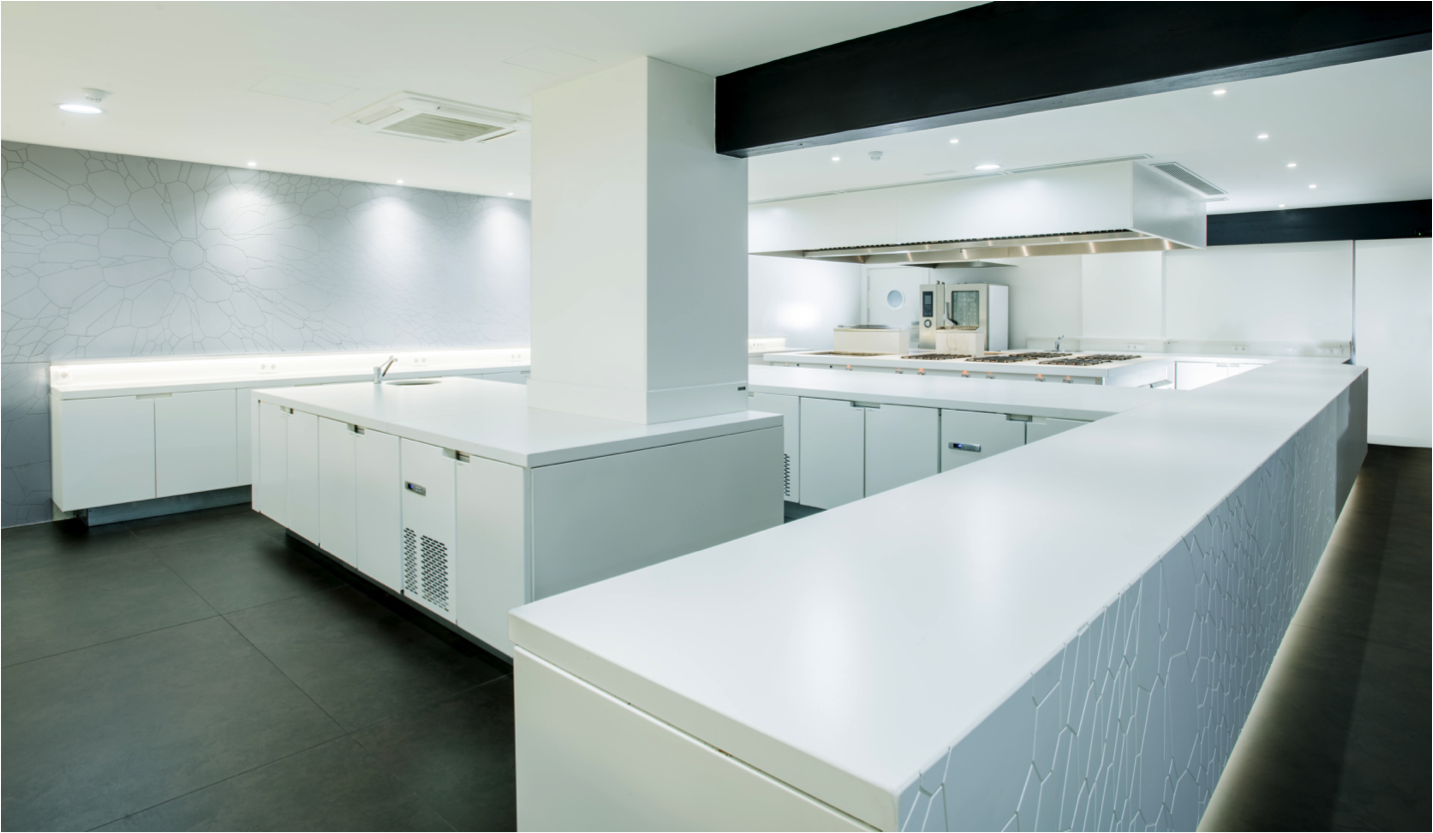 Imagen del restaurante de Dani García